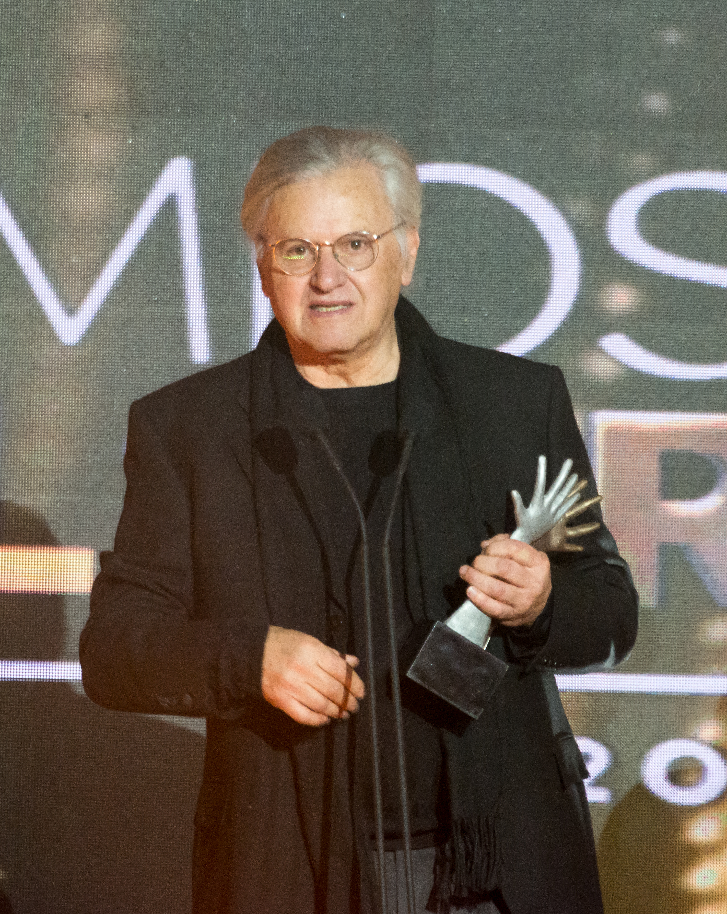 Premios Pulsar 2019, Teatro Teletón, Santiago, Región Metropolitana, Chile.